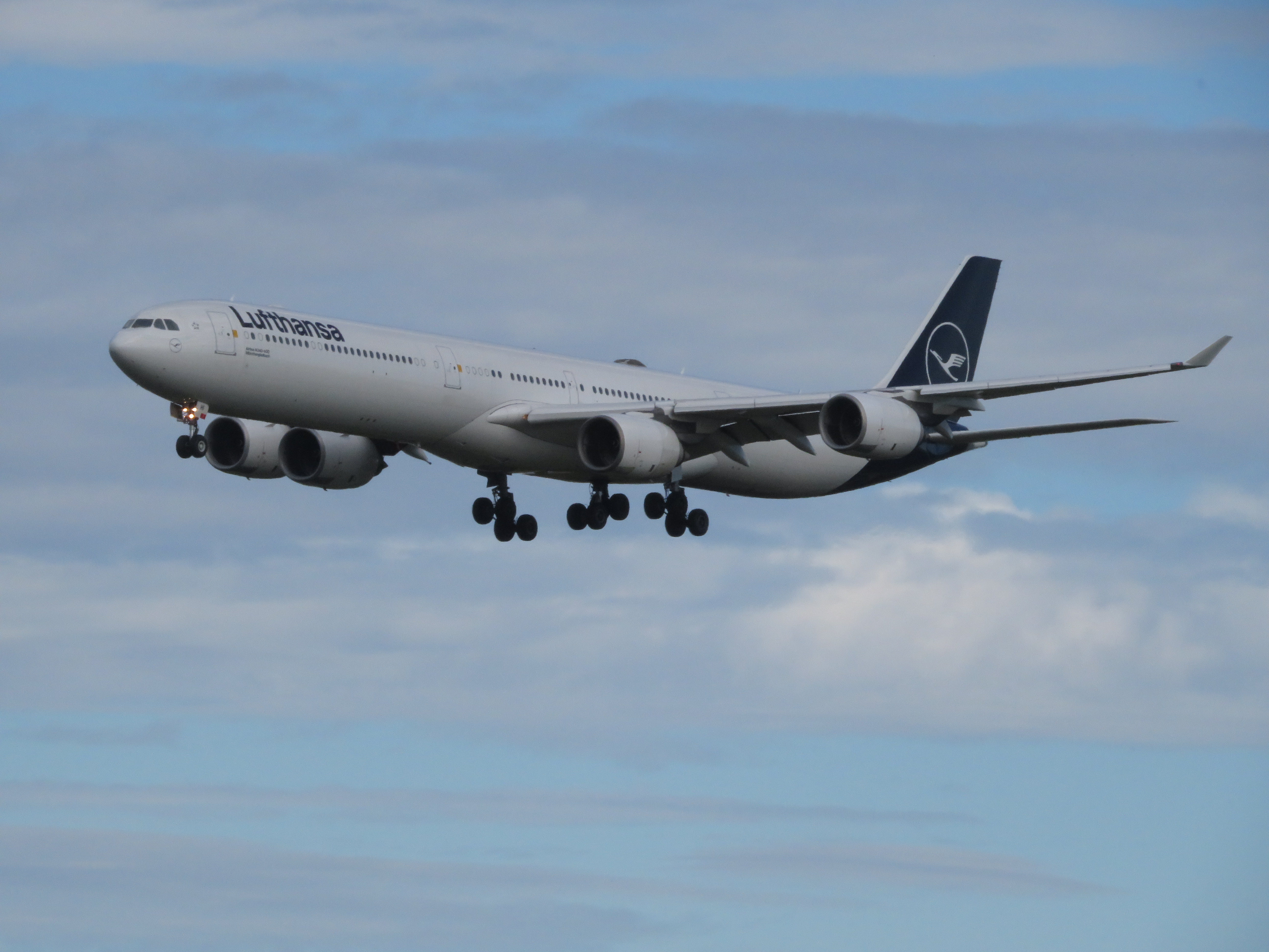 Lufthansa A340-600 D-AIHI 2019-10-01 Munich Airport Airbus A340-642 cn/serial number: 569